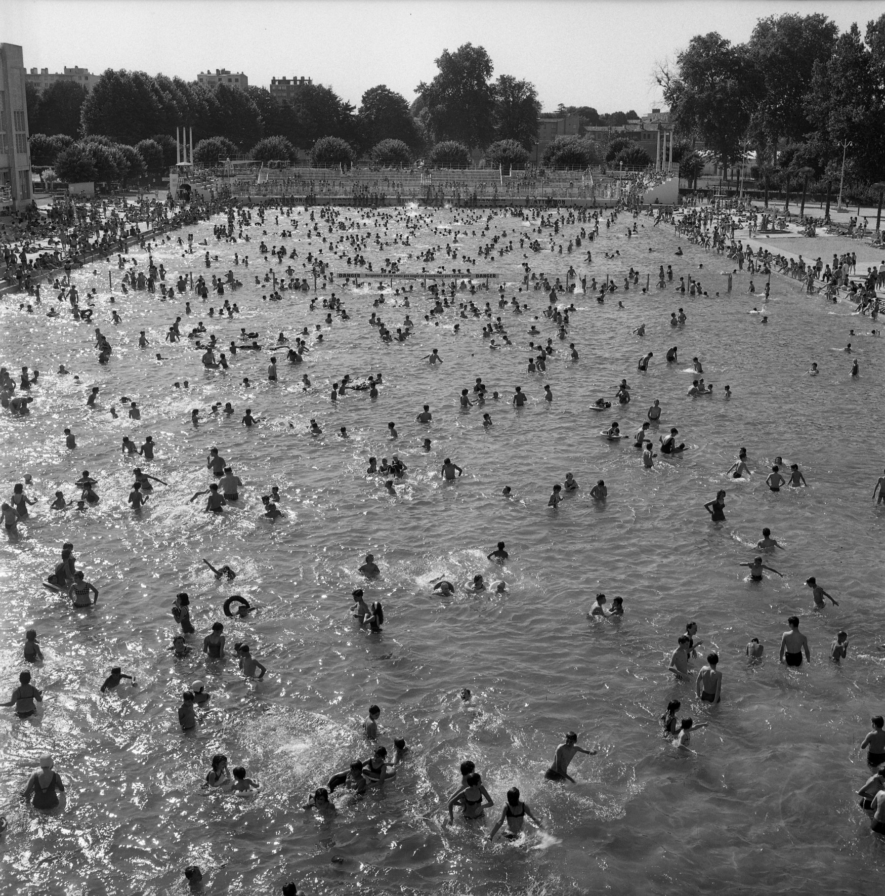 Parc des Sports. Le 15 Juillet 1964. Vue de la piscine dans le Parc des Sports.